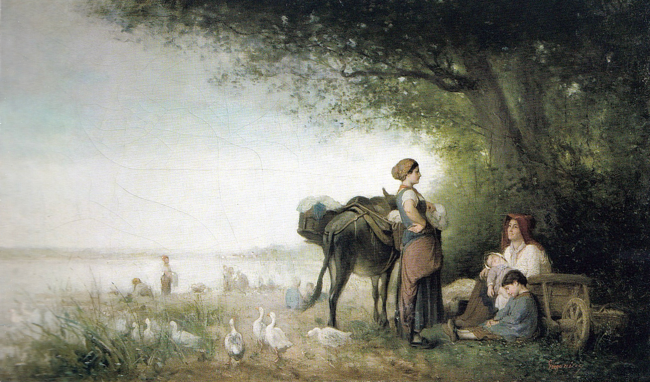 Spălătorese la râu, ulei pe pânză, 56x96,3cm - Galeria de Artă Românească Modernă de la Muzeul Național de Artă al României.